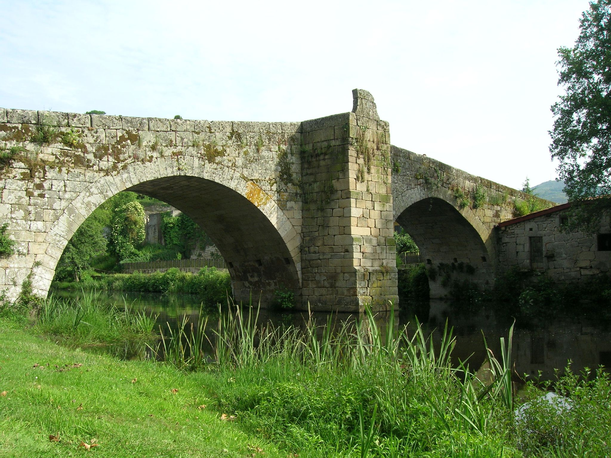 El antiguo puente de Allariz se conoce como puente de Vilanova, por la proximidad a la iglesia del mismo nombre.